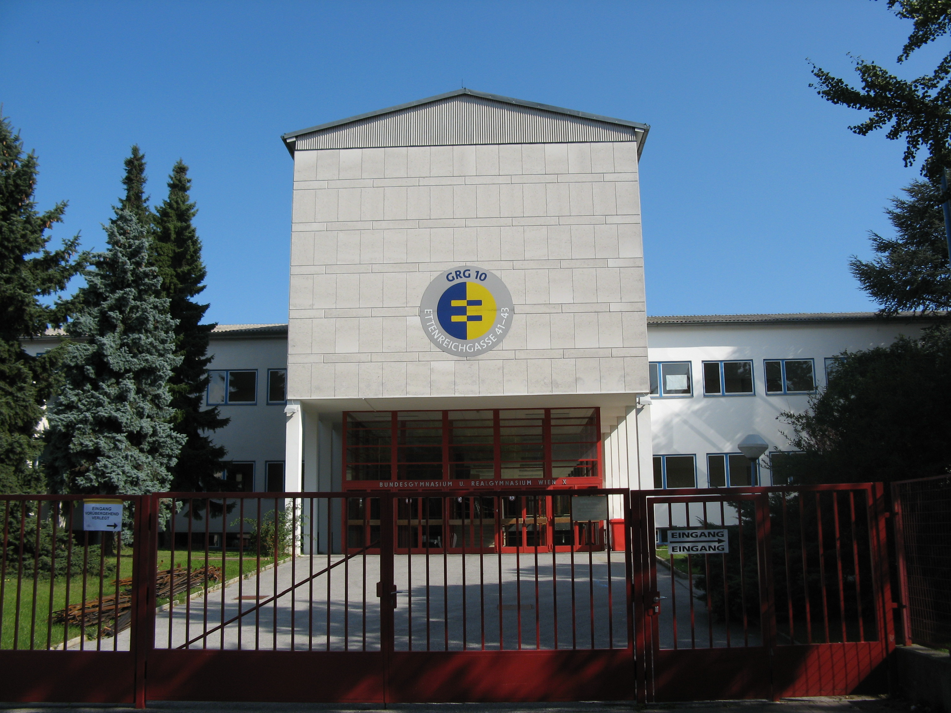 Bundesrealgymnasium X (1958-60) von Wilhelm Hubatsch, Ettenreichgasse 41-43, Wien-Favoriten